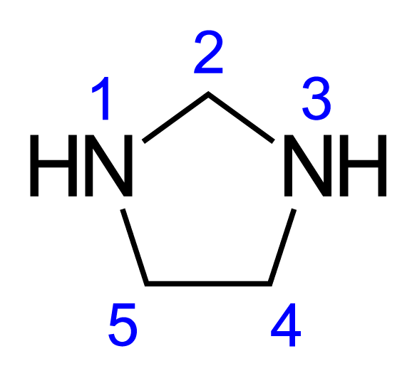 chemical structure of imidazolidine